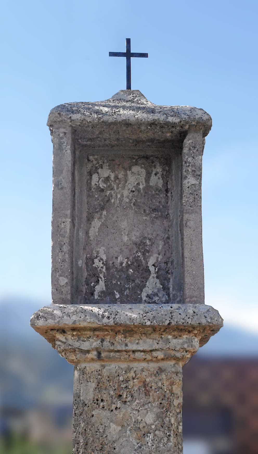 Bildstock Nr. 5 Richtung Osten - Bundesstraße, Thaur